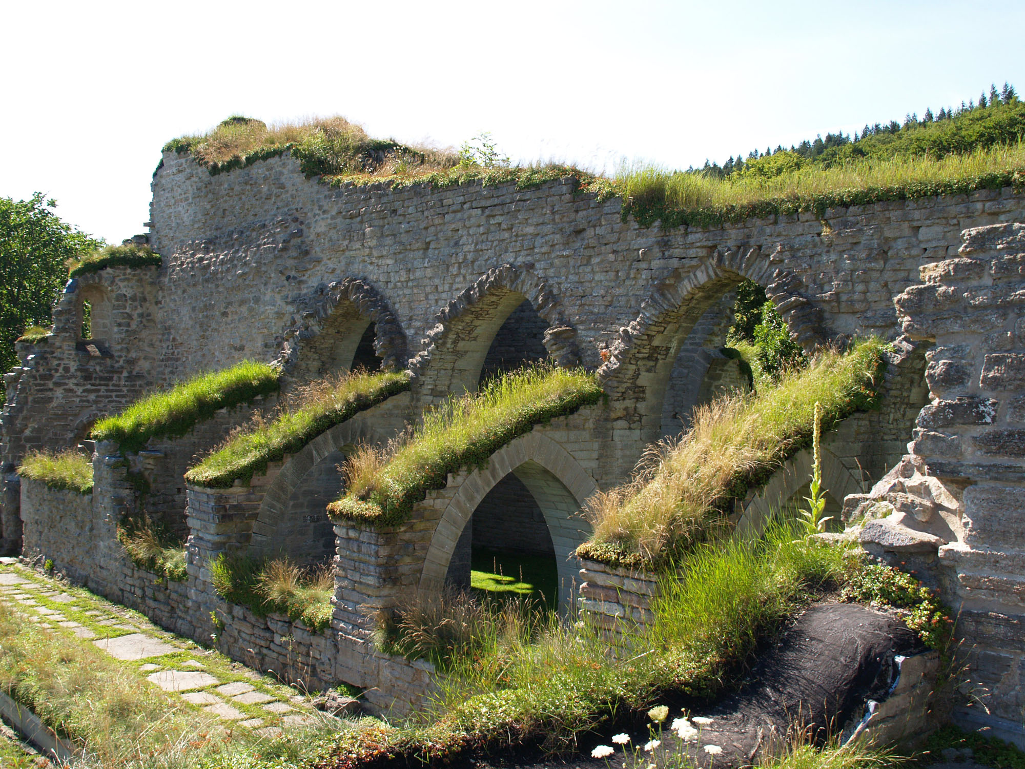 Klosterruine Alvastra, Ödeshög kommun, Svergie